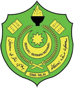 Logo SMA Nilai